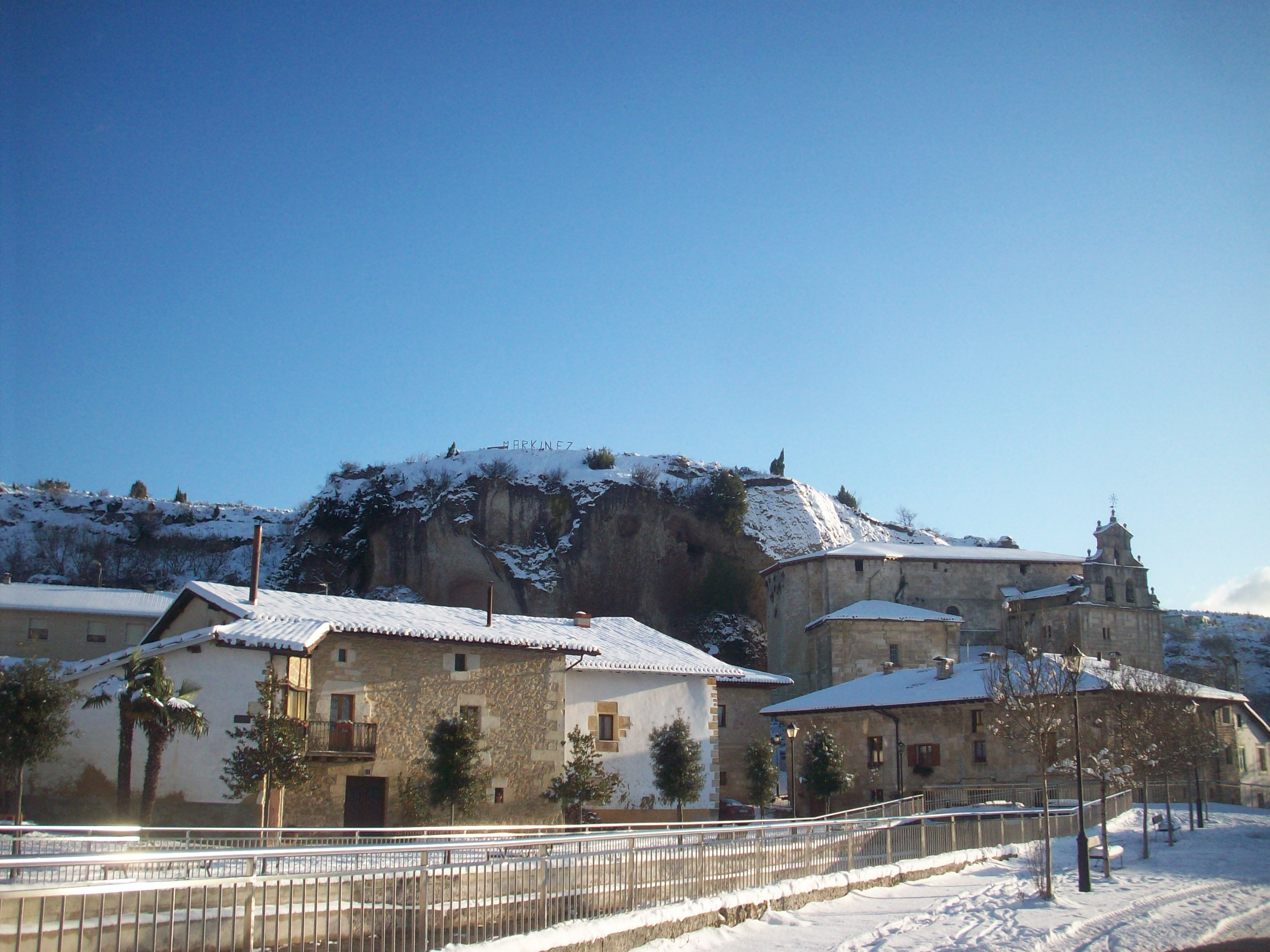 Iglesia de Santa Eulalia de Marquinez y peña Askana